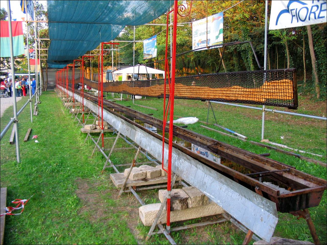 Sagra del gnocco fritto - Castelletto di Serravalle (BO) Signori, il gnocco fritto piu' lungo del mondo! (41m)